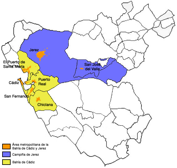 Plano del área metropolitana de Jerez y la Bahía de Cádiz